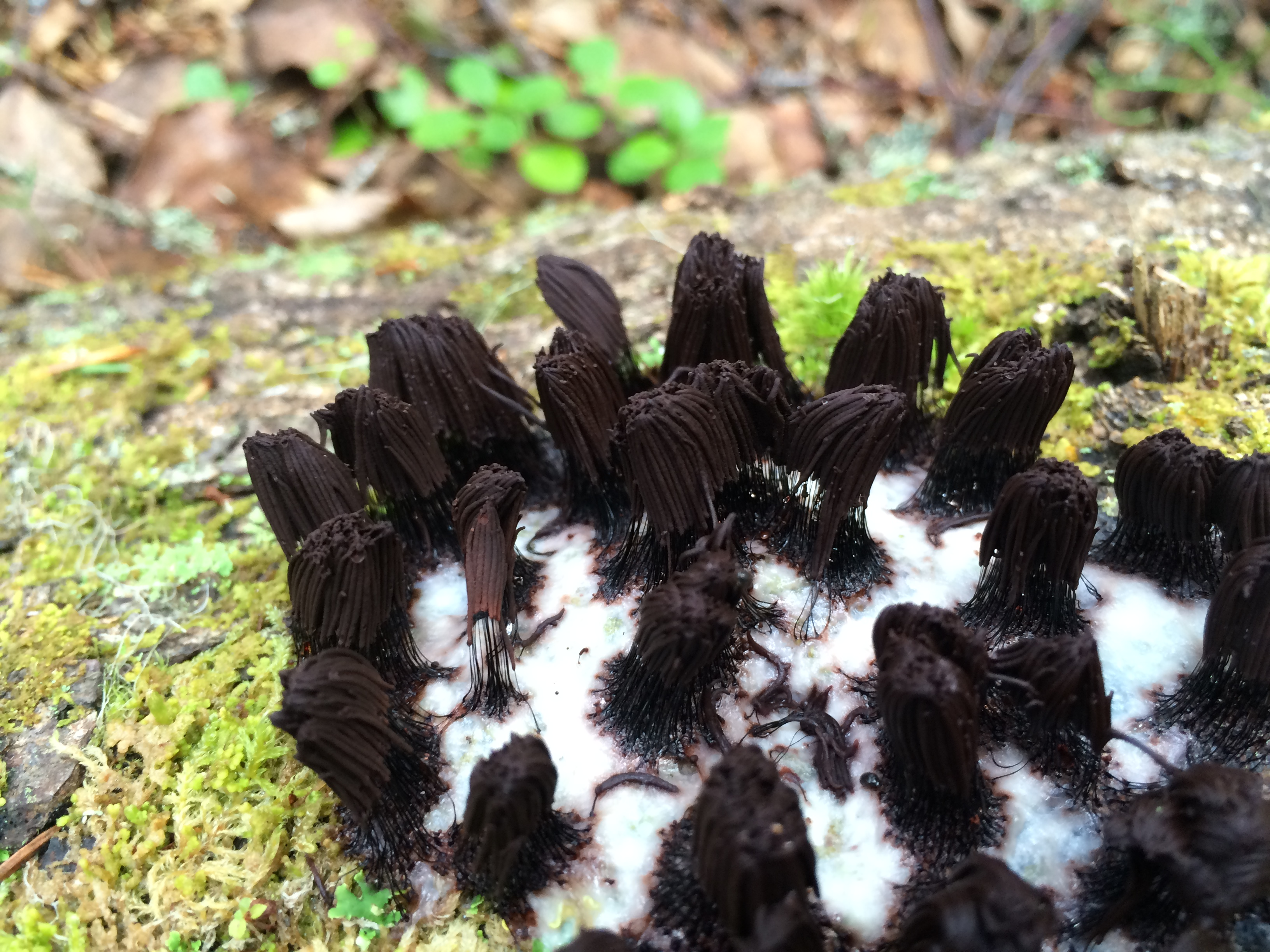 Närbild av samma exemplar av S. fusca i sporkroppsfas, fotograferad i Fillingen, Nordmaling den 15 juli 2016.